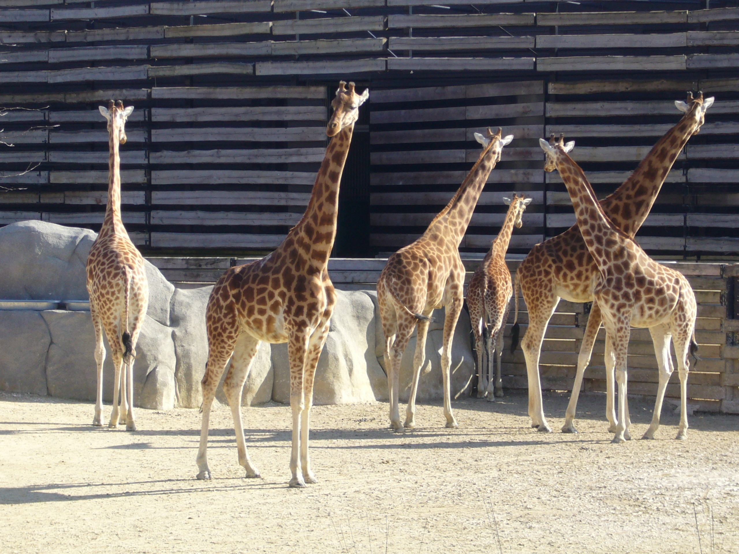 Giraffa camelopardalis, Zoo de Vincennes